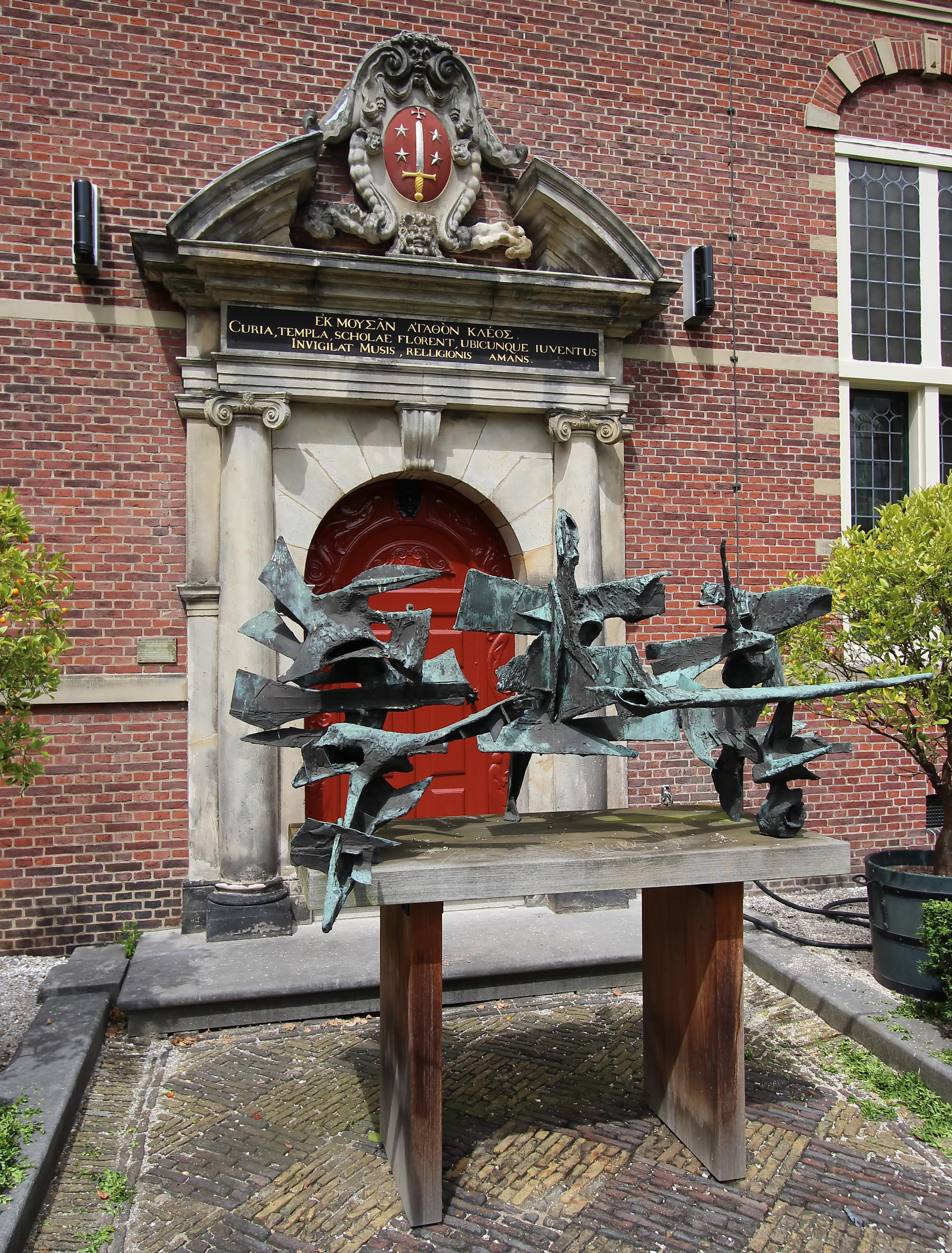 frans hals museum, haarlem (136)